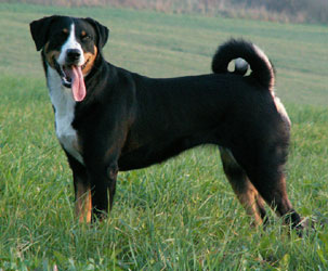 Dara Essi, Appenzeller Sennenhund